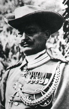 Theodor Leutwein en Namibie (a ce moment Deutsch-Südwestafrika). Photographie datant de plus de 100 ans Source : [1] Sujet : Le major Leutwein lors de son mandat dans le sud-ouest africain (1894-1904)